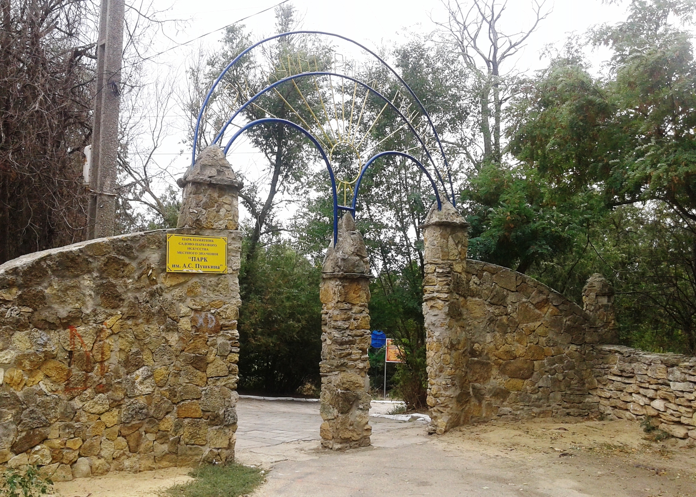 Вікіекспедиція у Буджак